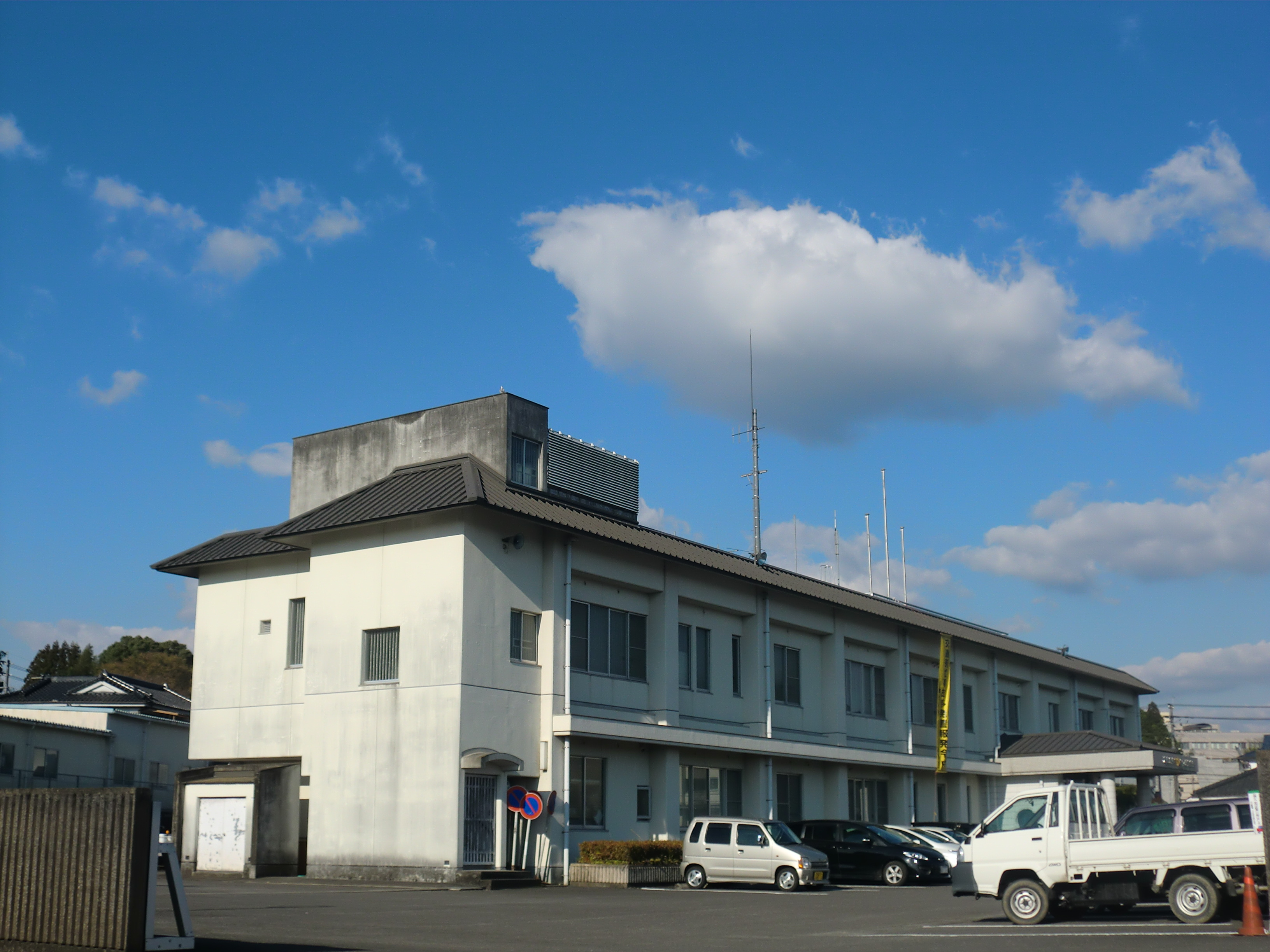 薩摩郡さつま町にあるさつま警察署（旧：宮之城警察署）